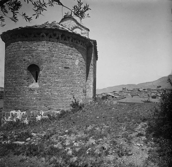 Capella de Sant Pere Màrtir a Sant Romà d'Abella. Josep Salvany i Blanch (1920)